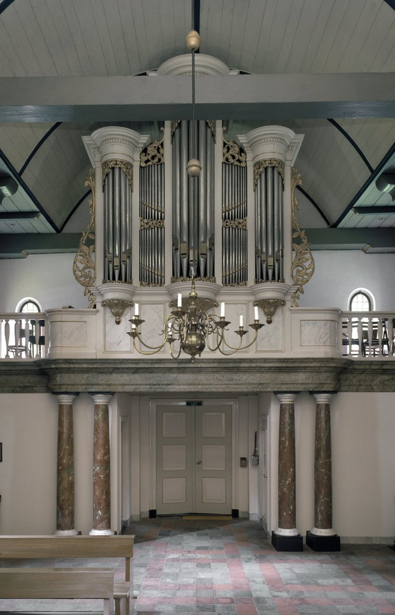 Nederlands Hervormde Kerk: Interieur, aanzicht orgel, orgelnummer binnenwerk 1119, orgelnummer kas 1120 (opmerking: Gefotografeerd voor Het Historische Orgel in Nederland 1858-1865)